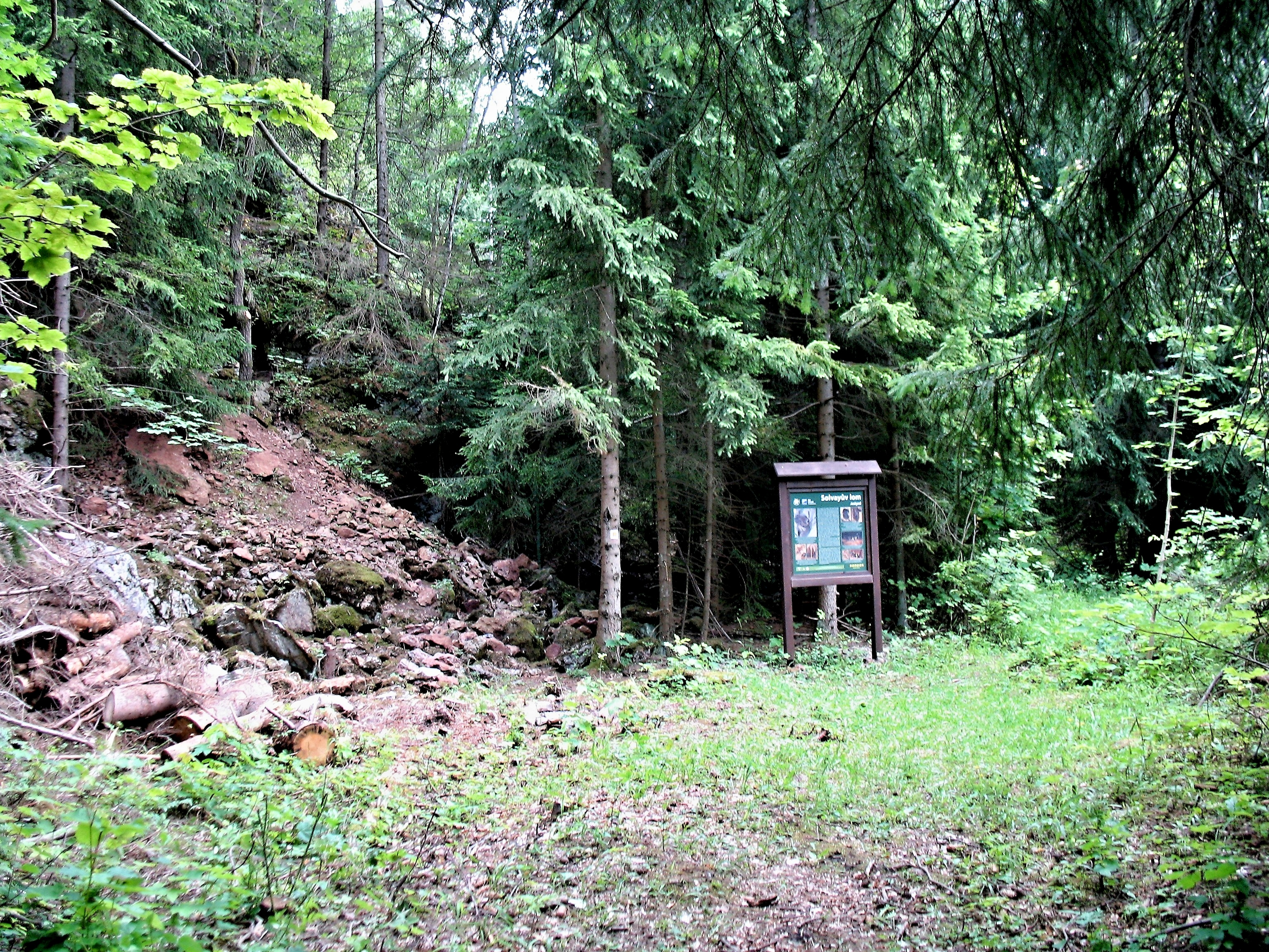 Loupežnická jeskyně u bývalého Solvayova lomu v Křižanech. Prostranství u jeskyně